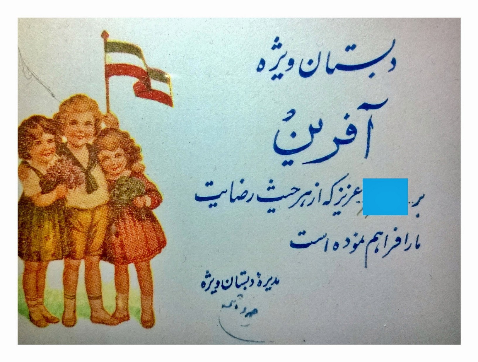 کارت آفرین دبستان ویژه، تهران ۱۳۴۲. مدیره دبستان صدیقه آشتیانی